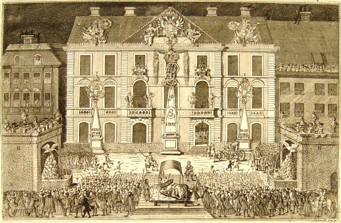 Palais Schwerin im Jahr 1742, Kupferstich. Der Bildtext lautet: Ordentliche Abbildung der Illumination, wegen der in Rußland geschehenen Crönung Ihro Rußisch-Kayserl. Majestät ELISABETH PETROWNA, so am 14. Junii 1742, in der Residentz Berlin dieserhalb höchstfeyerlich an Sr. Excellentz des Grafen von Czernichew Behausung aufm Molcken-Marckt begangen worden.